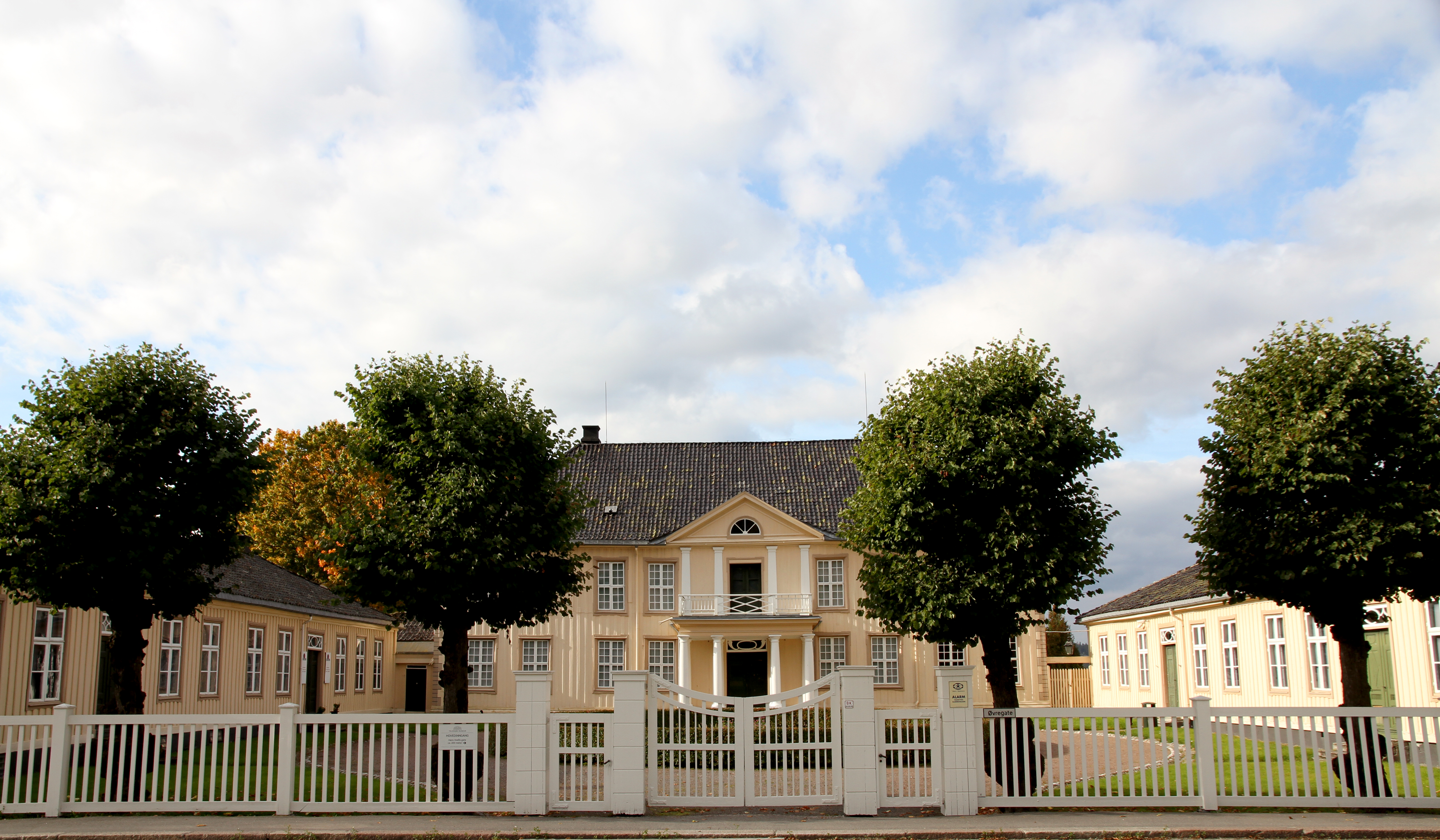 Søndre Brekke gård ligger i Brekkeparken i Skien og er administrasjonssenteret for Telemark Museum.